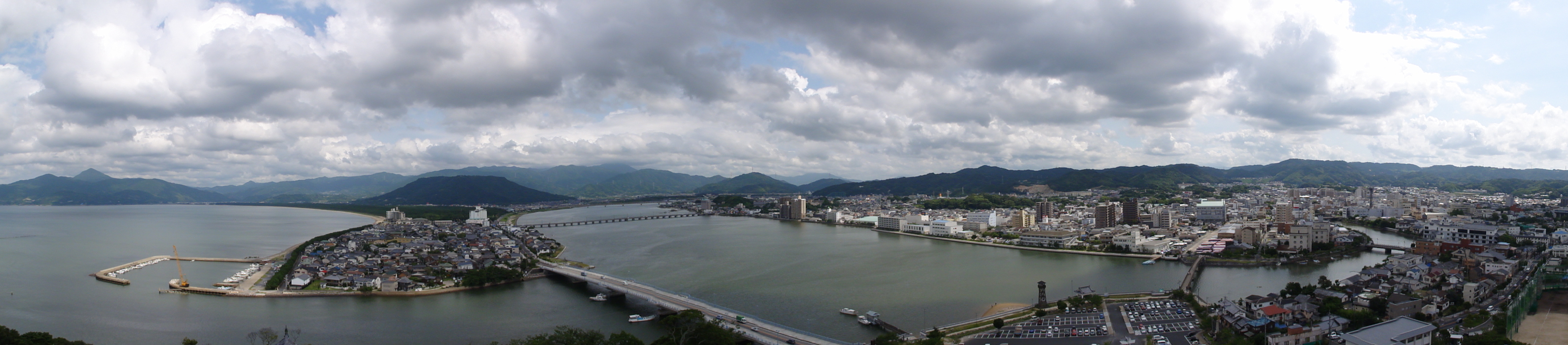 唐津城から唐津市街を望む